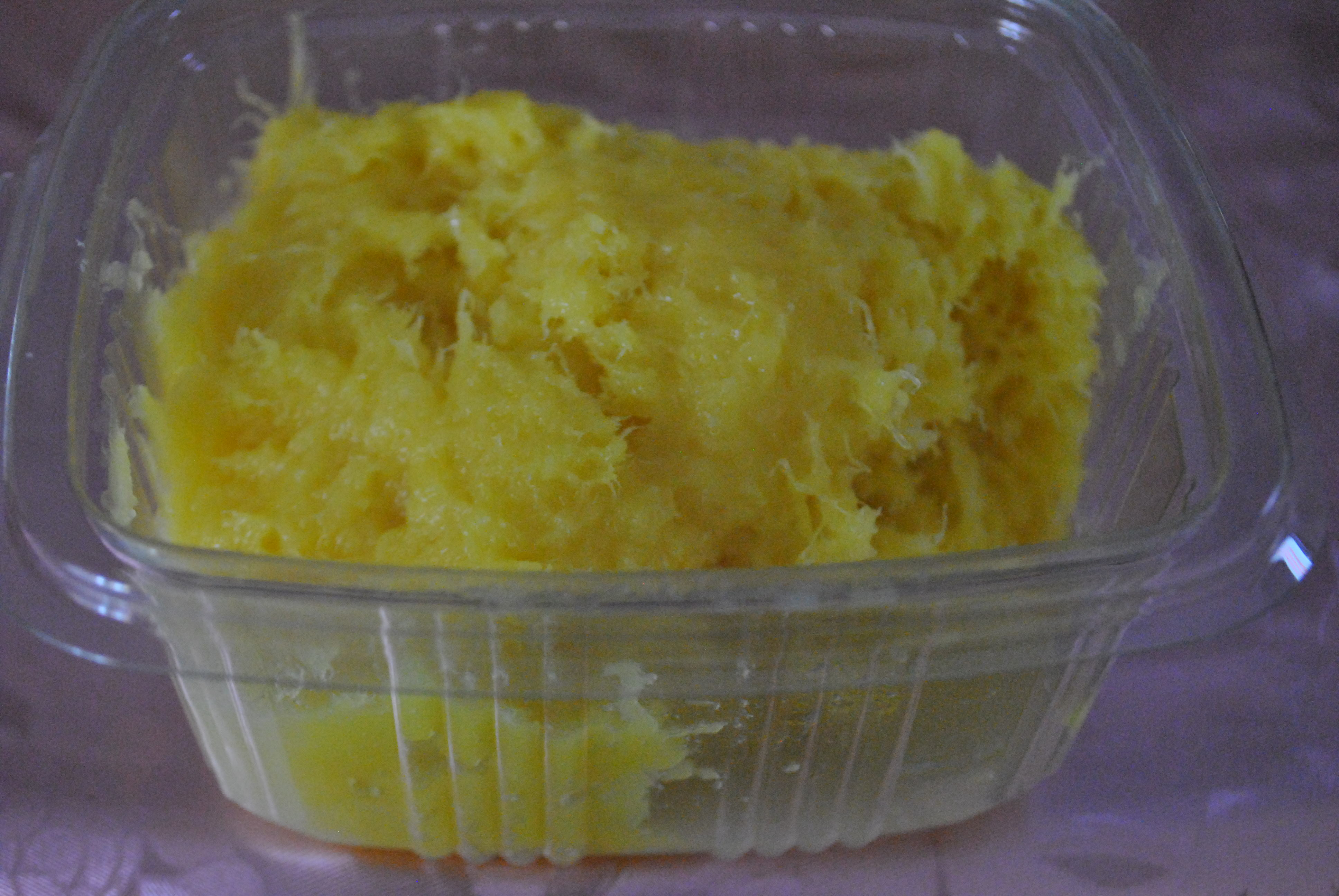 Türk mutfağının tatlılarından peynir helvası